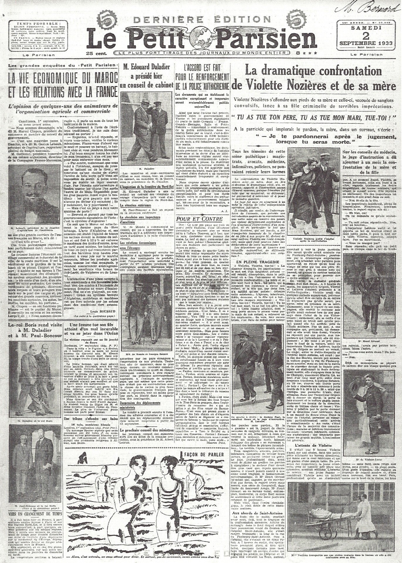 Journal Le Petit Parisien, édition du 2 septembre 1933